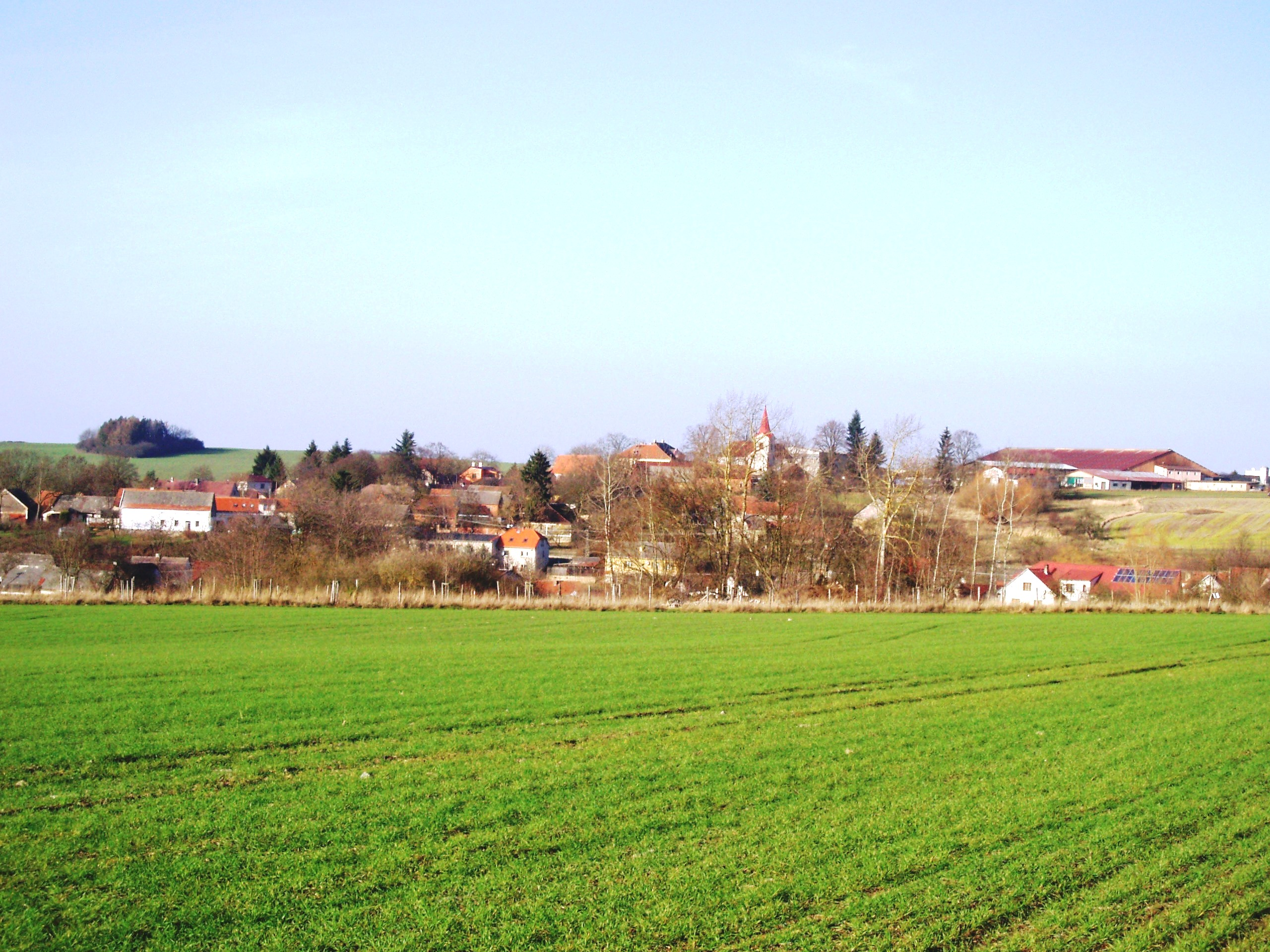 Celkové foto obce Číčov